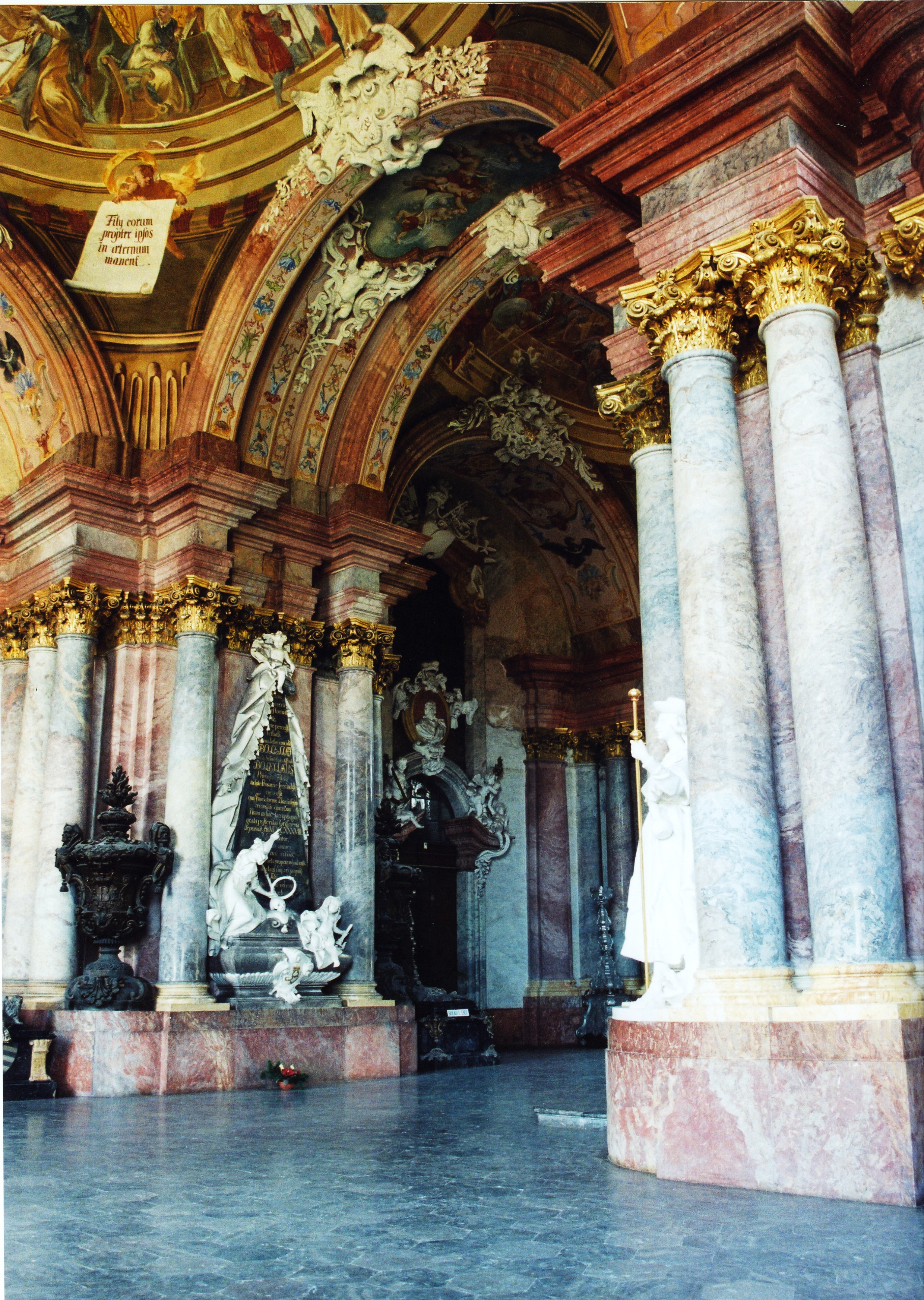 Krzeszów, cysterski zespół klasztorny - kościół p.w. Najświętszej Marii Panny, wnętrze i ołtarz w nawie głównej